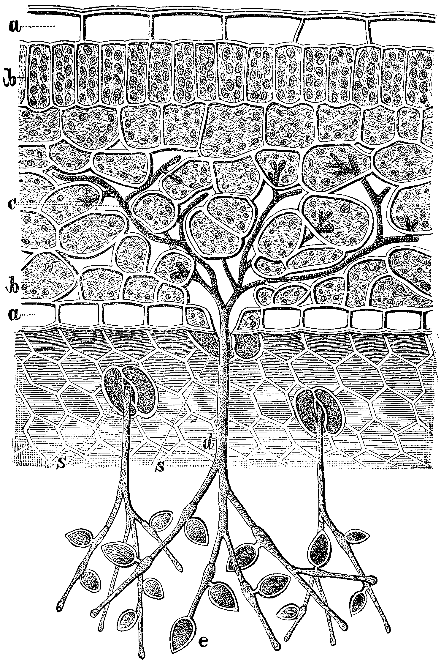 Slika 329. Krompirjeva plesen. (Peronóspora inféstans. [sic])